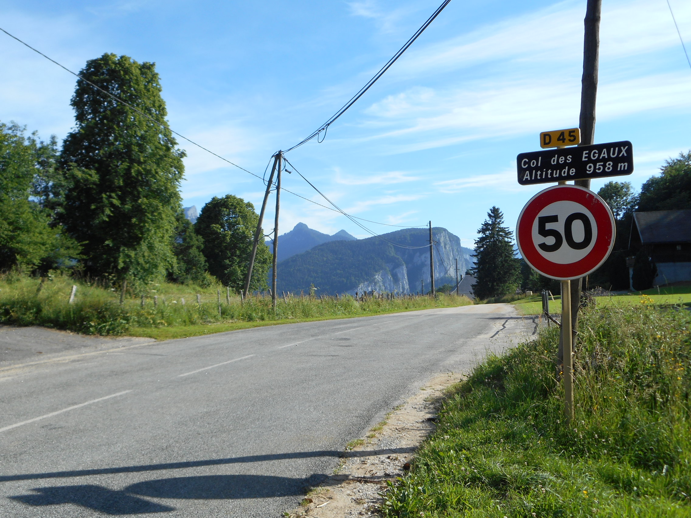 Col des Egaux, Corbel. Prise le 26.06.2015.